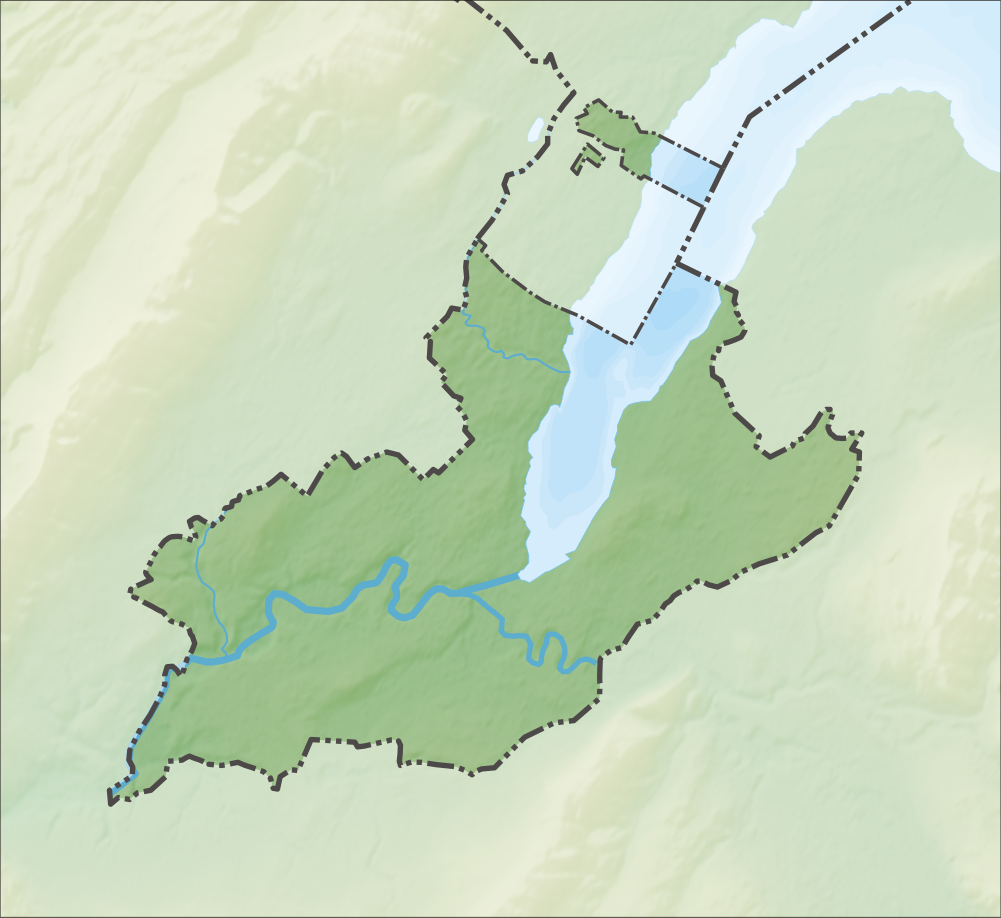 Reliefkarte des Kantons Genf Topographischer Hintergrund: NASA Shuttle Radar Topography Mission (public domain). SRTM3 v.2.